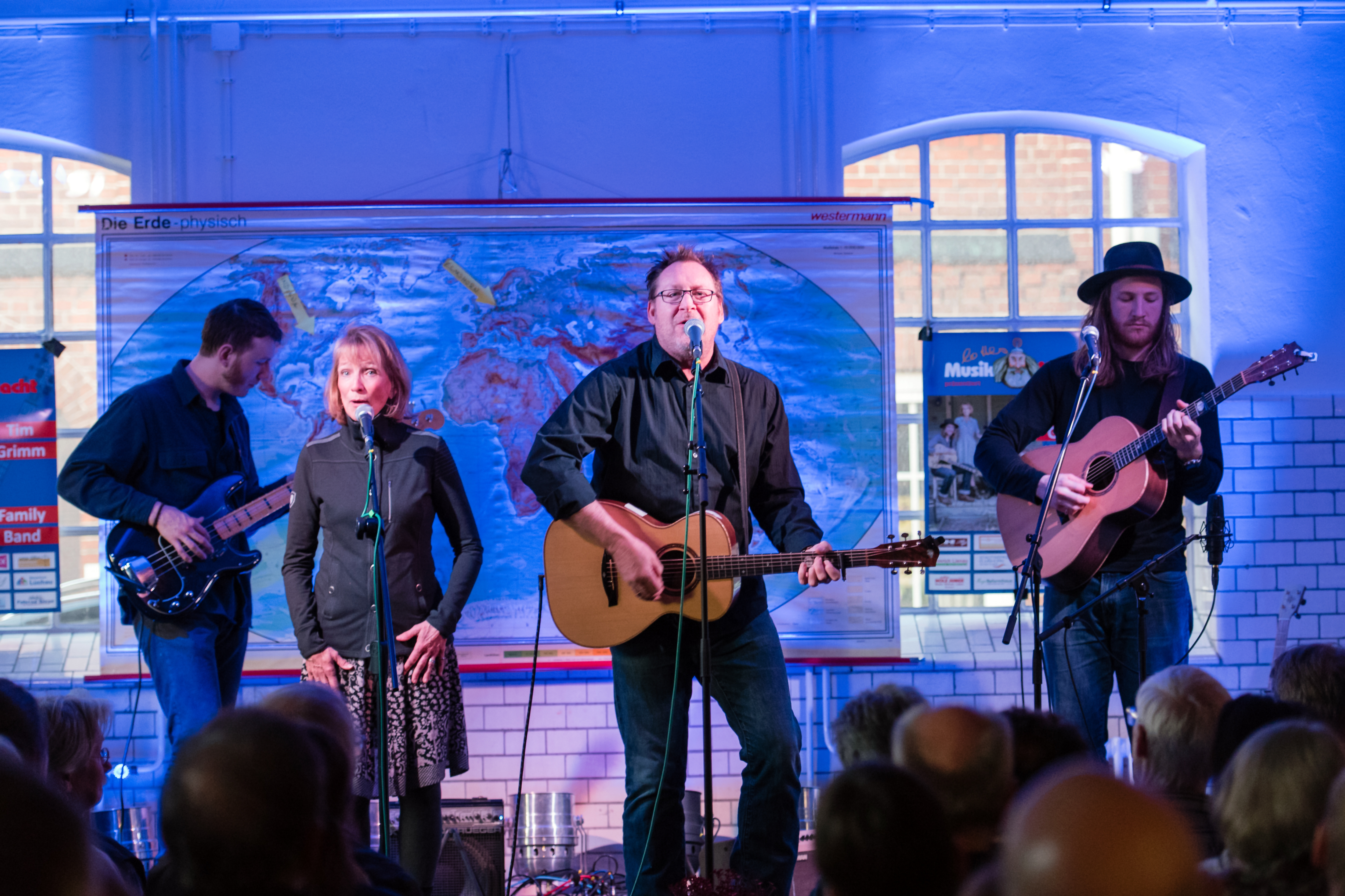 Tim Grimm and Family Band bei Lottes Musiknacht im Industriemuseum Elmshorn 2017